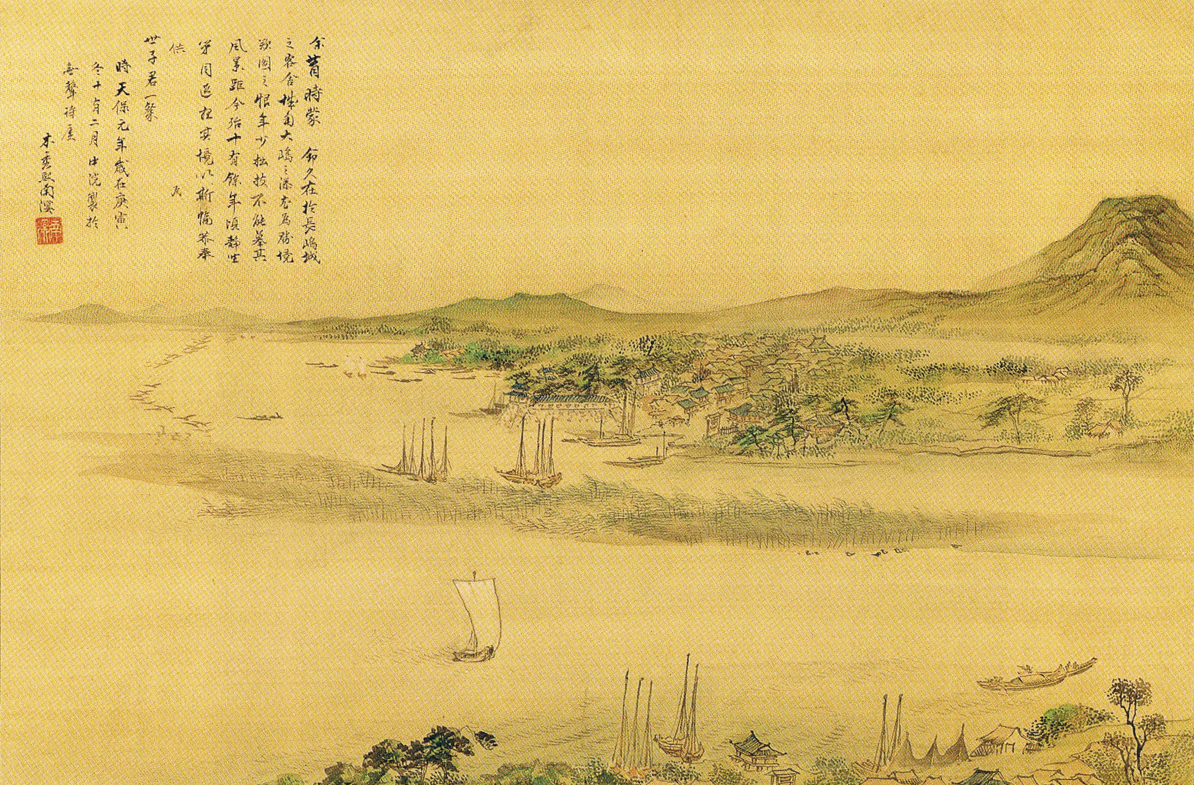 春木南溟筆 長島桑名真景図 天保元年